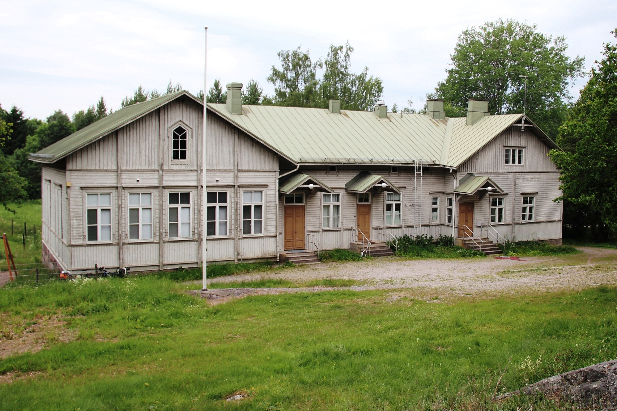 Lohjansaaren koulu, lakkautettu, Lohja. Rakennettu 1898.